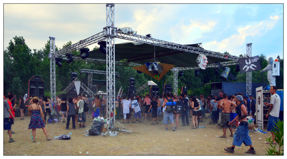 Free party in nord Italia.